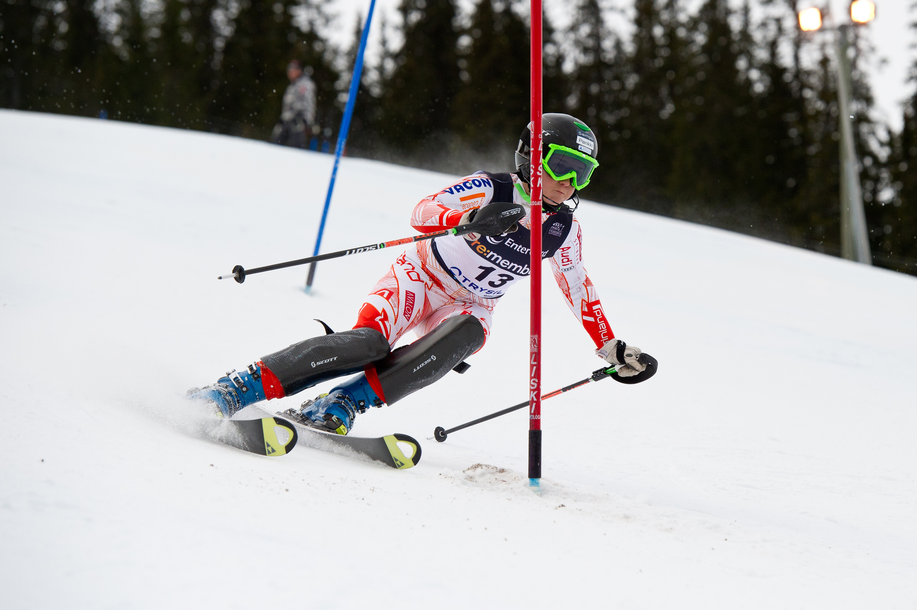 Nr. 3 Merle Soppela (Fin) i NM i slalåm i Trysil 27. mars 2011. Foto: Ola Matsson.